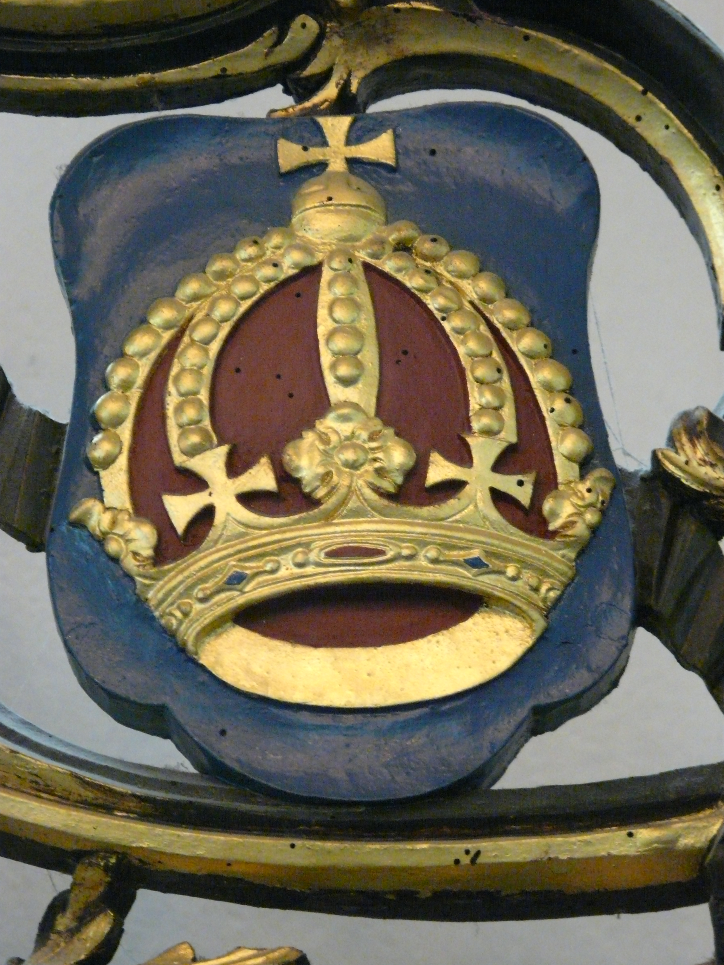 coats of arms of te former chapter of St.Mary in Utrecht NL